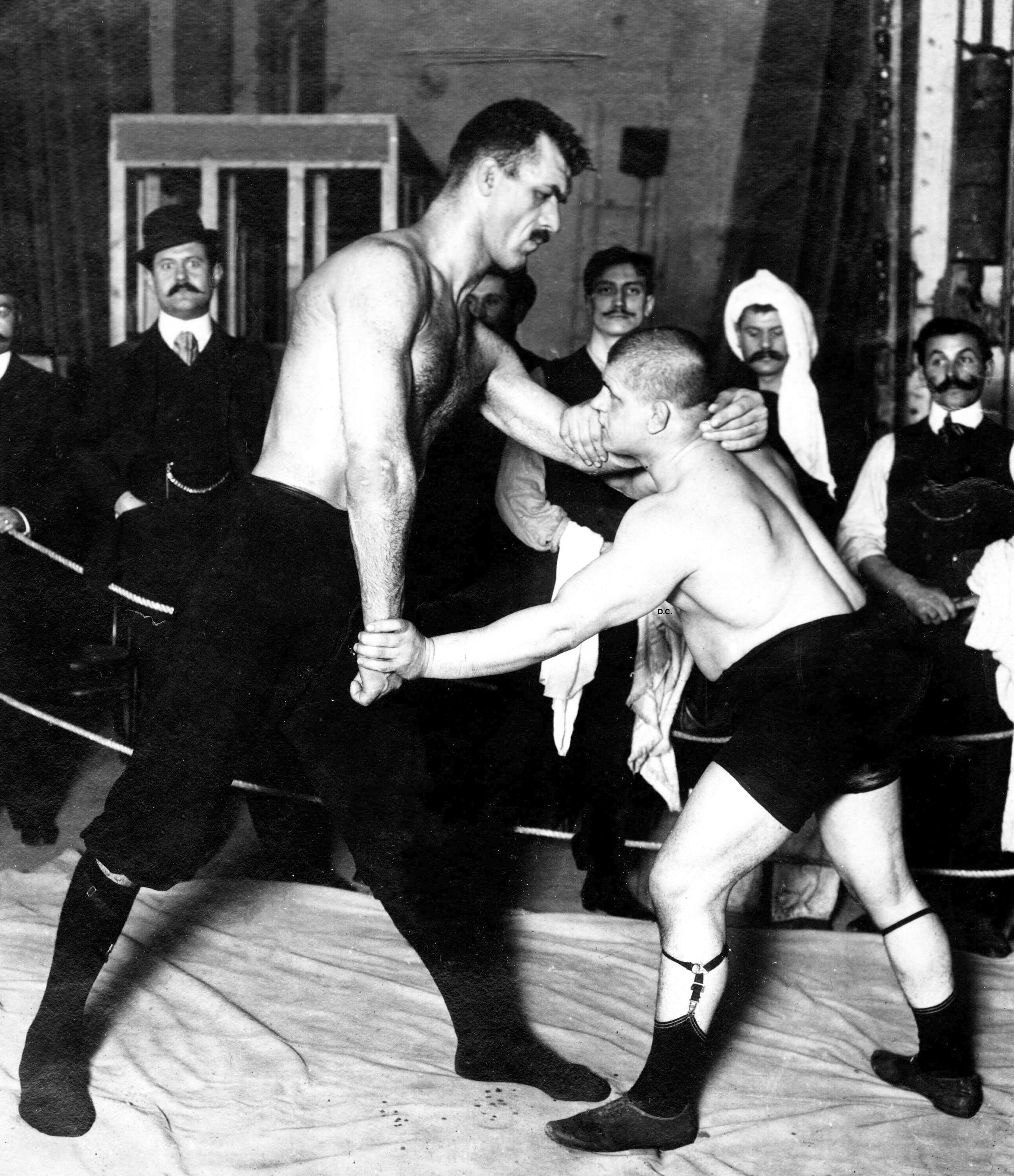 Il combattimento tra Giovanni Raicevich, a destra, e il serbo Simon Antonich, a sinistra, un gigante di 210 cm di altezza e 130 chili di peso; questa sfida ci riporta alla mente la lotta biblica tra il coraggioso Davide e il gigante Golia.